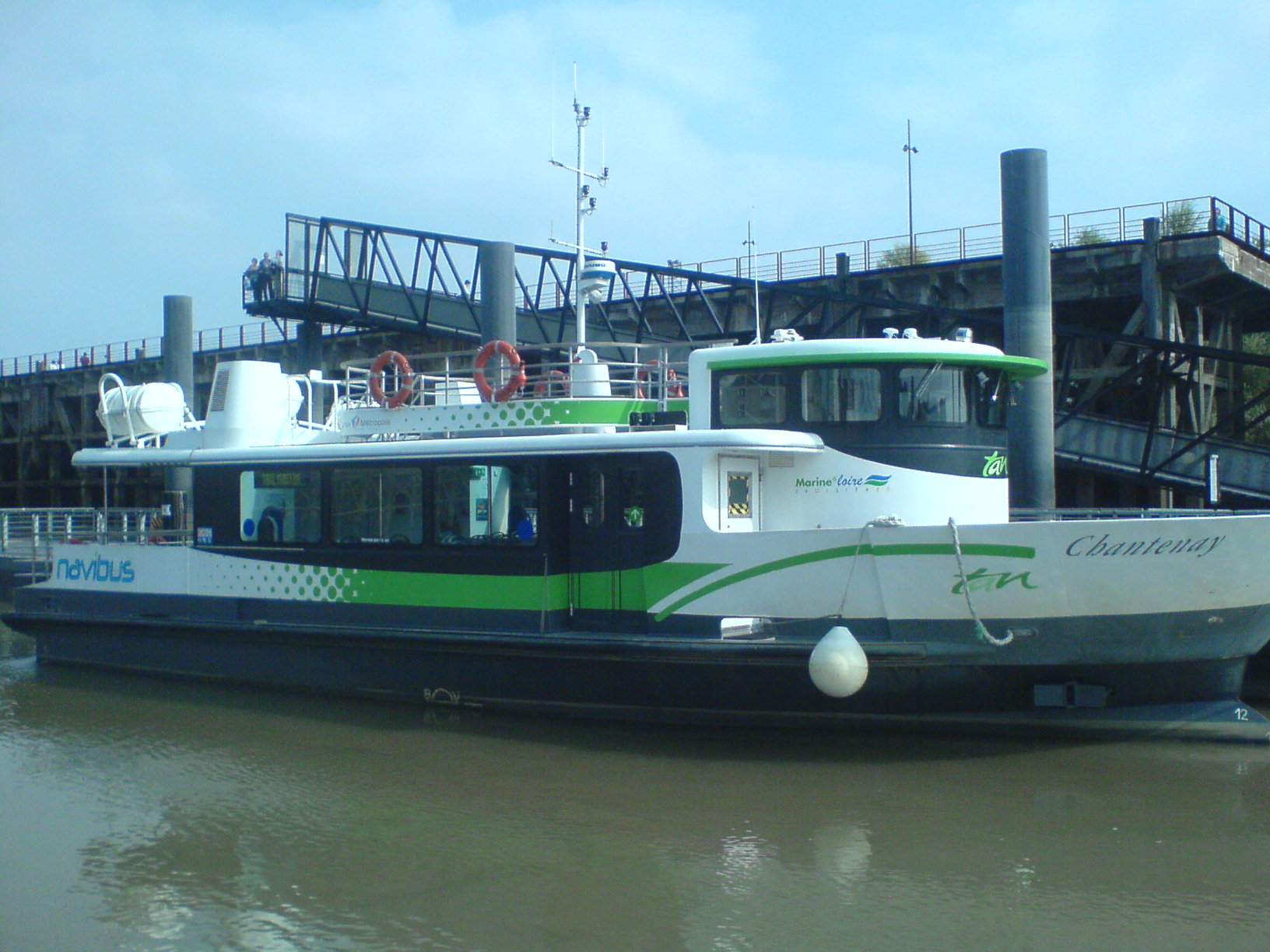 Le Navibus Chantenay accosté au ponton des chantiers de l'Île de Nantes